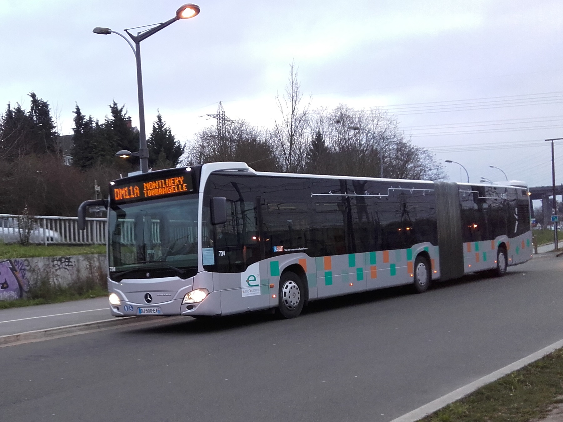 Mercedes Citaro C2 G n°734 en livré Europ'essonne en gare routière de Massy-Palaiseau